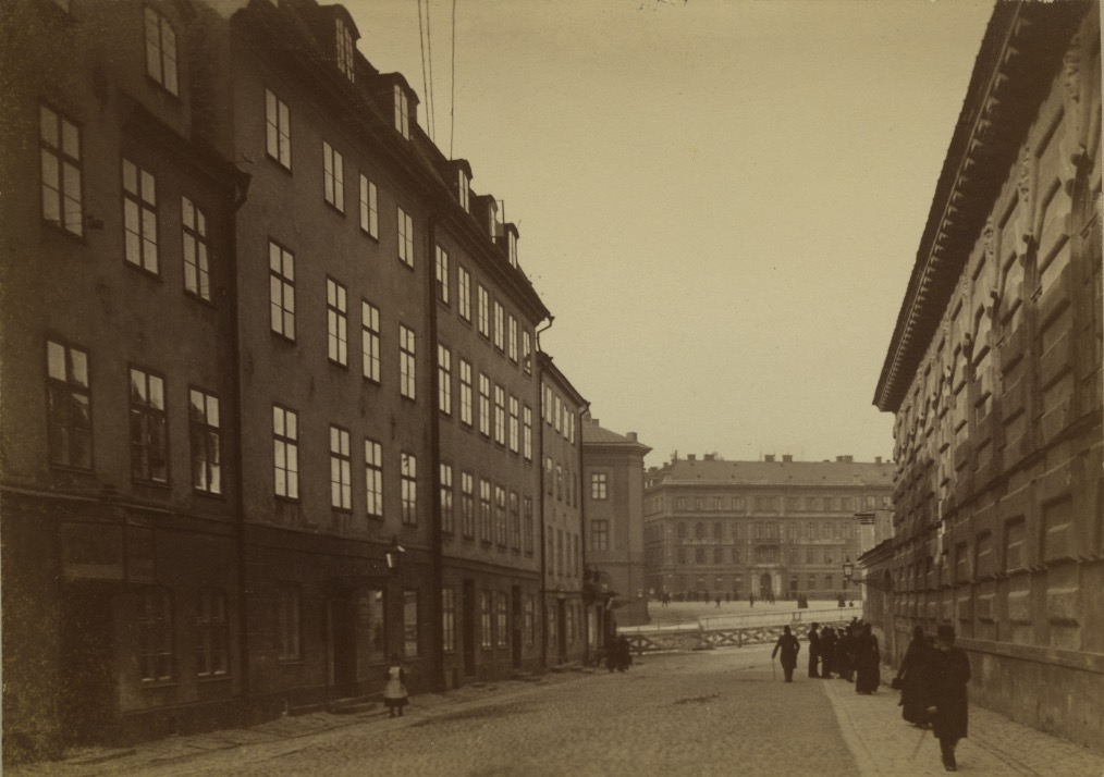 Gamla Norrbro den 9 april 1892, foto K. af Klercker